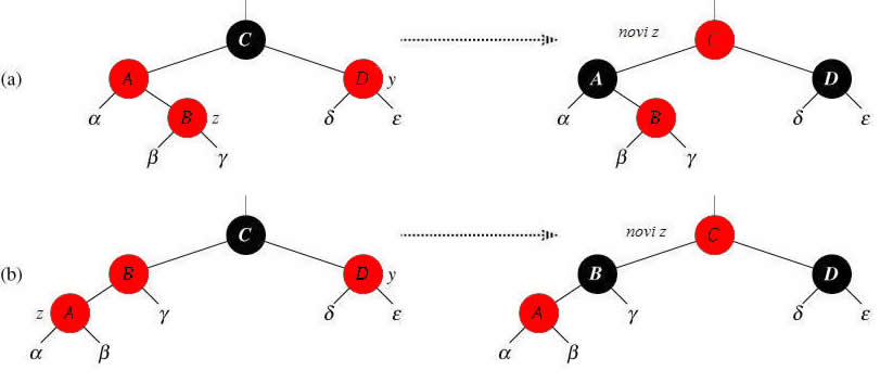 Umetanje čvorova